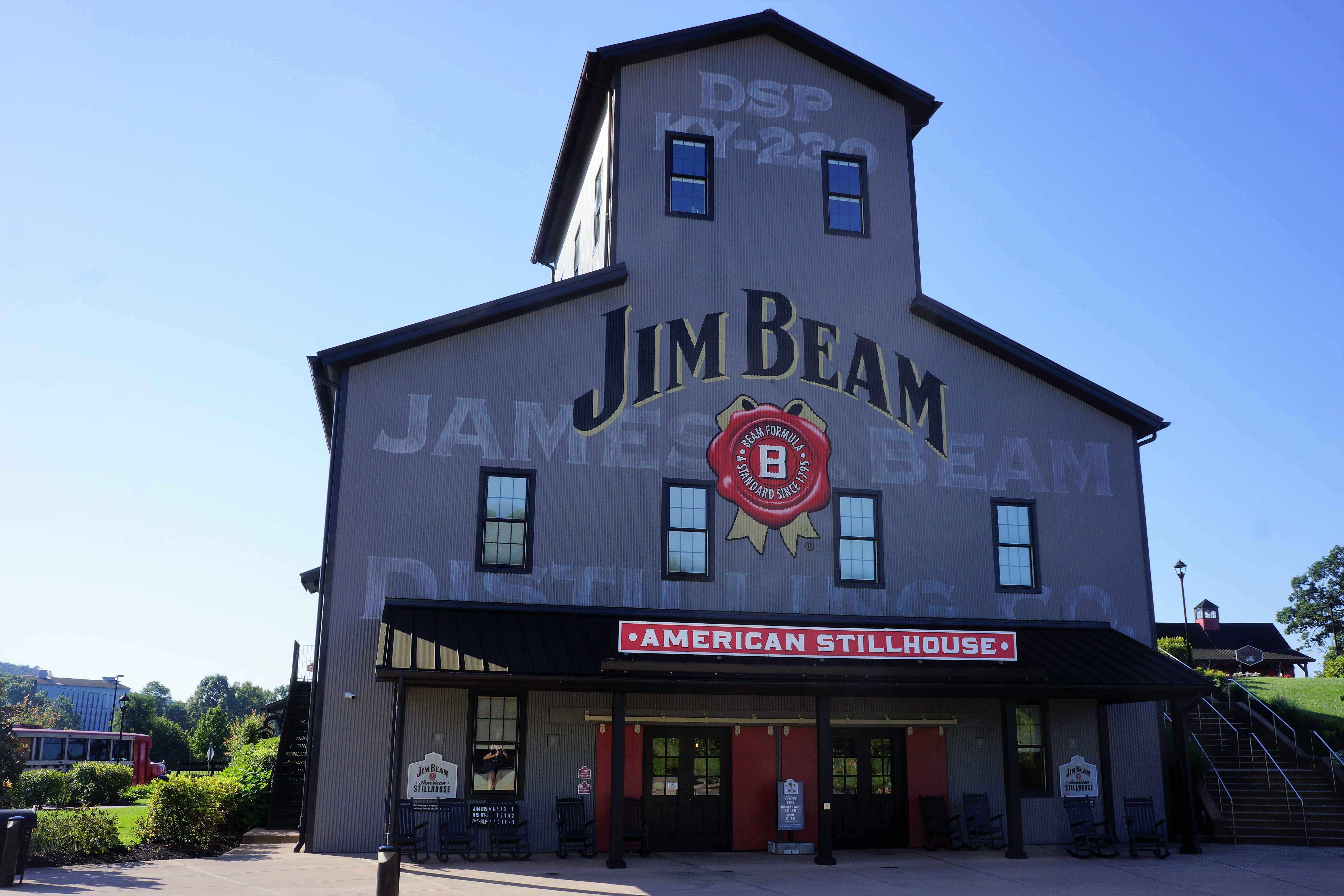 Billede af Jim Beams ikoniske grå "Stillhouse" bygning. Jim Beam er en af de allerstørste amerikanske whiskeyproducenter